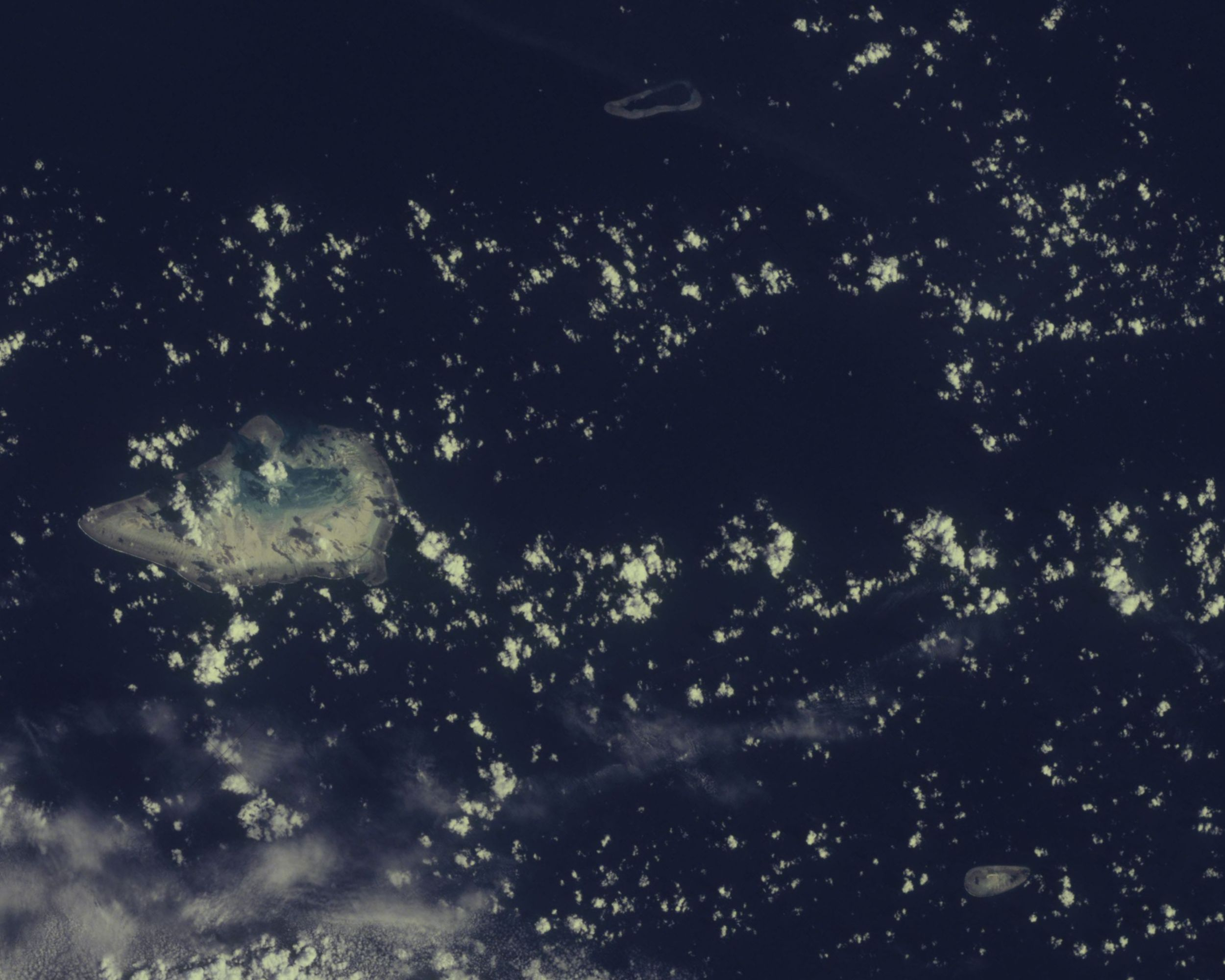 Wyspy Ashmore i Cartiera oraz rafa Hibernia widziane ze stacji Skylab (misja SL-4)